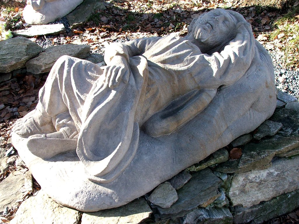 Góra Oliwna w Bolesławowie (Dolny Śląsk, Polska) – apostoł